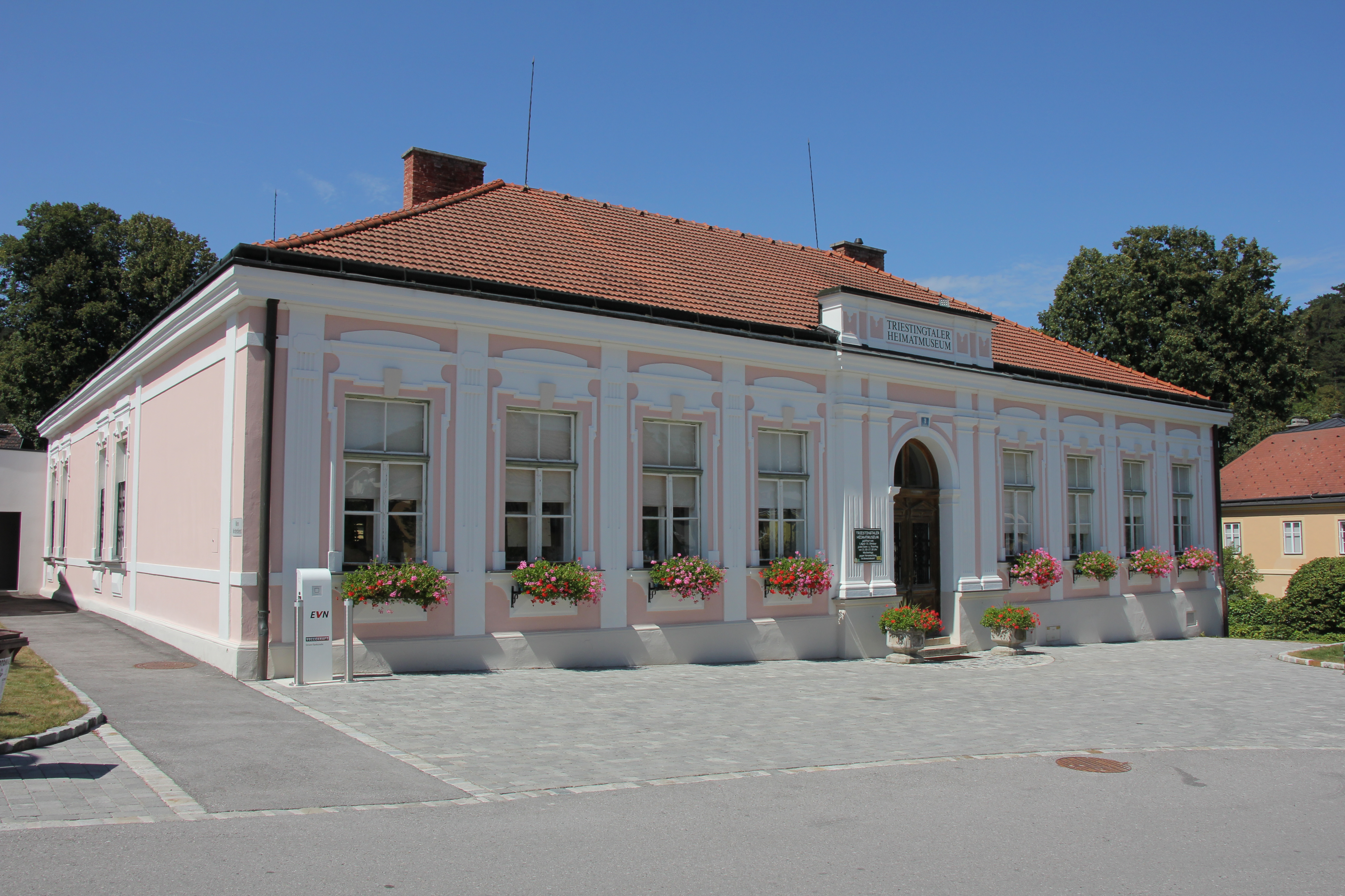 Heimatmuseum in Weissenbach an der Triesting